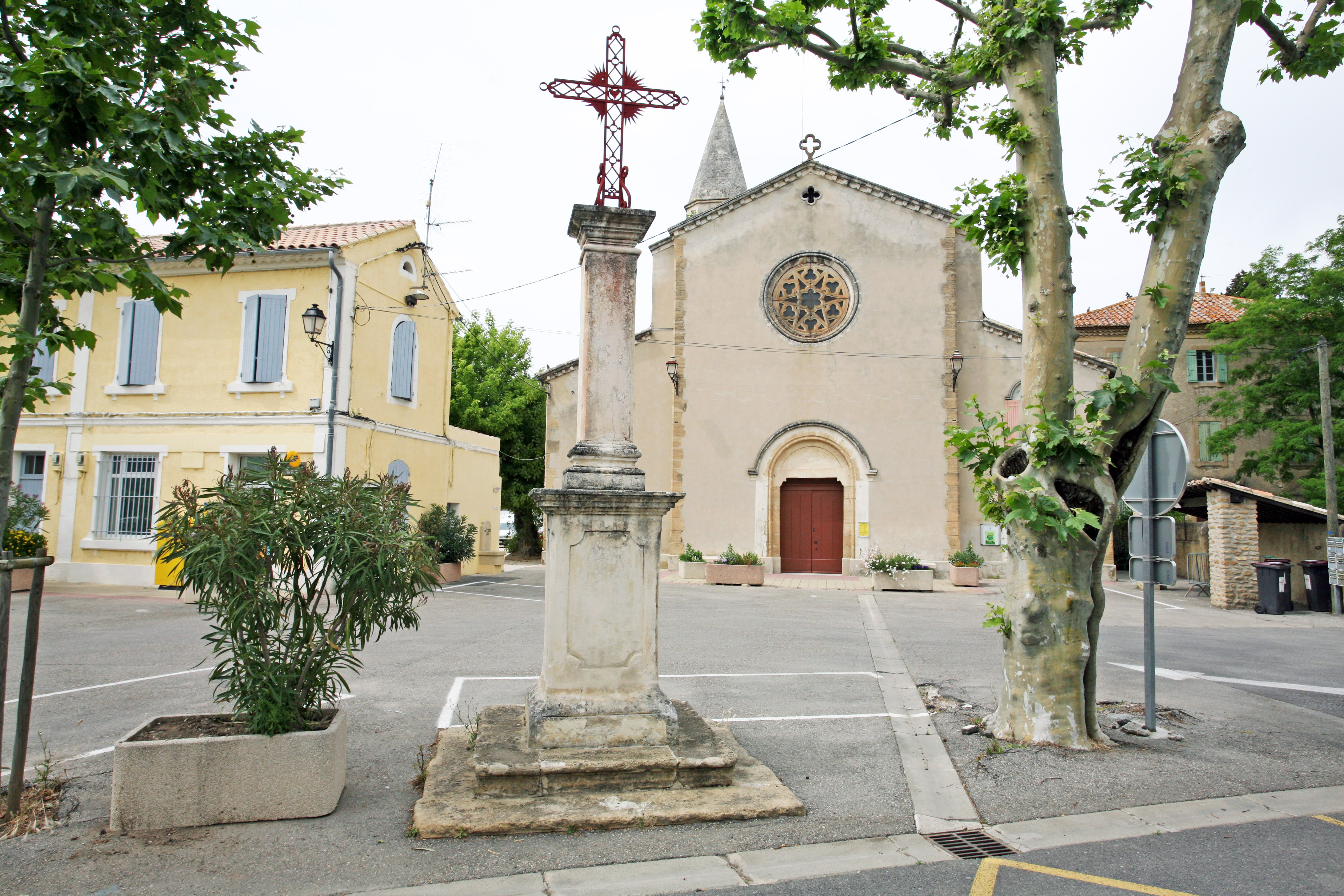 Église et croix de Travaillan (commune de Vaucluse)